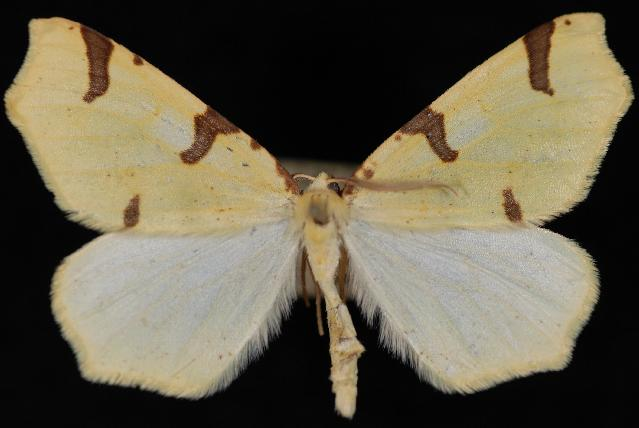 Neoterpes trianguliferata